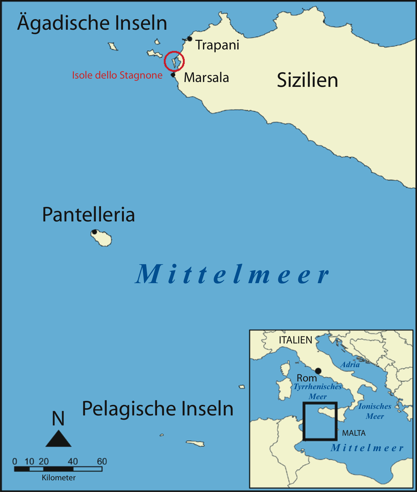 Position of Isole dello Stagnone (de)